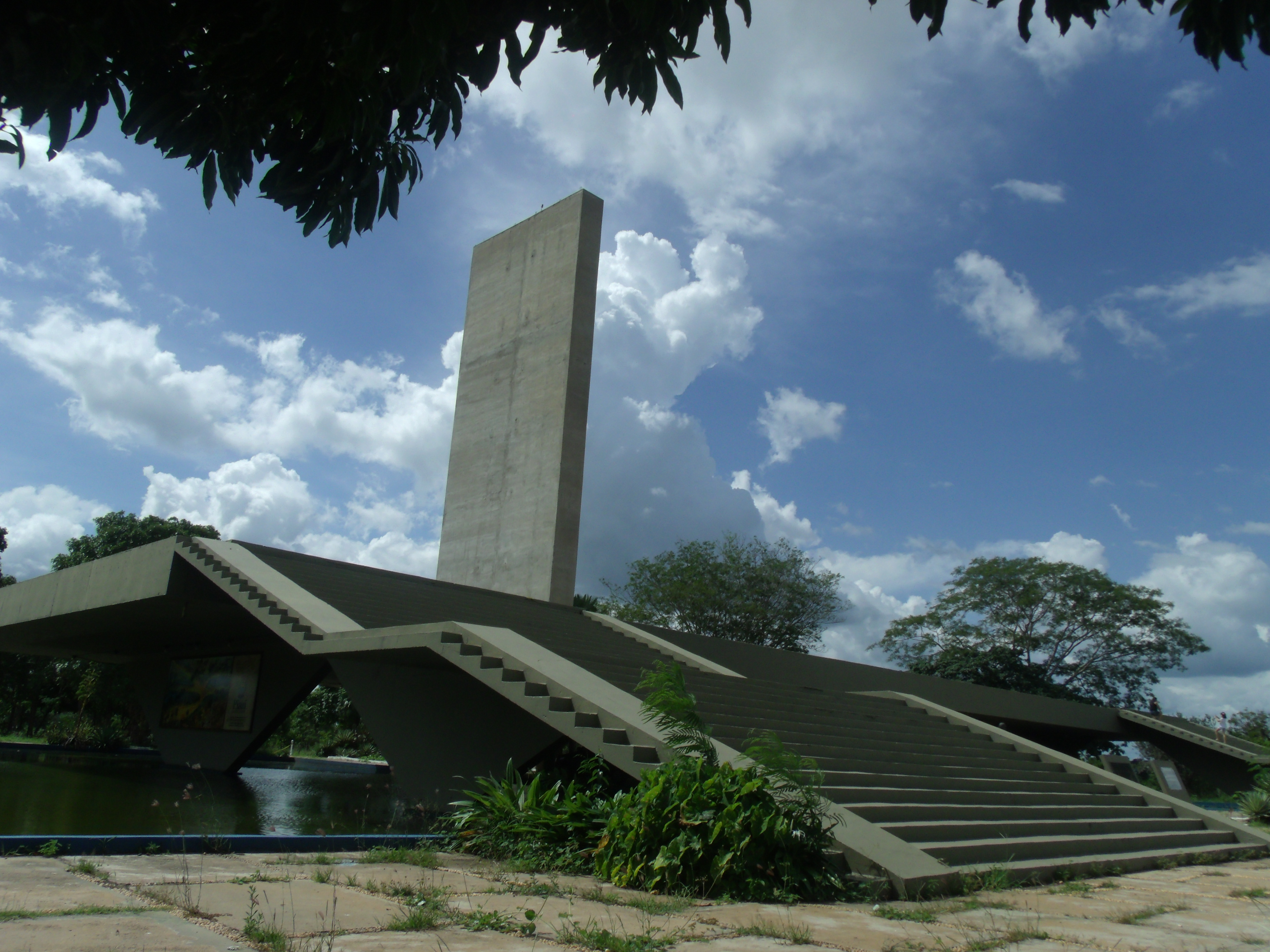 Monumento da Guerra do Jenipapo, em Campo Maior, no Piauí.